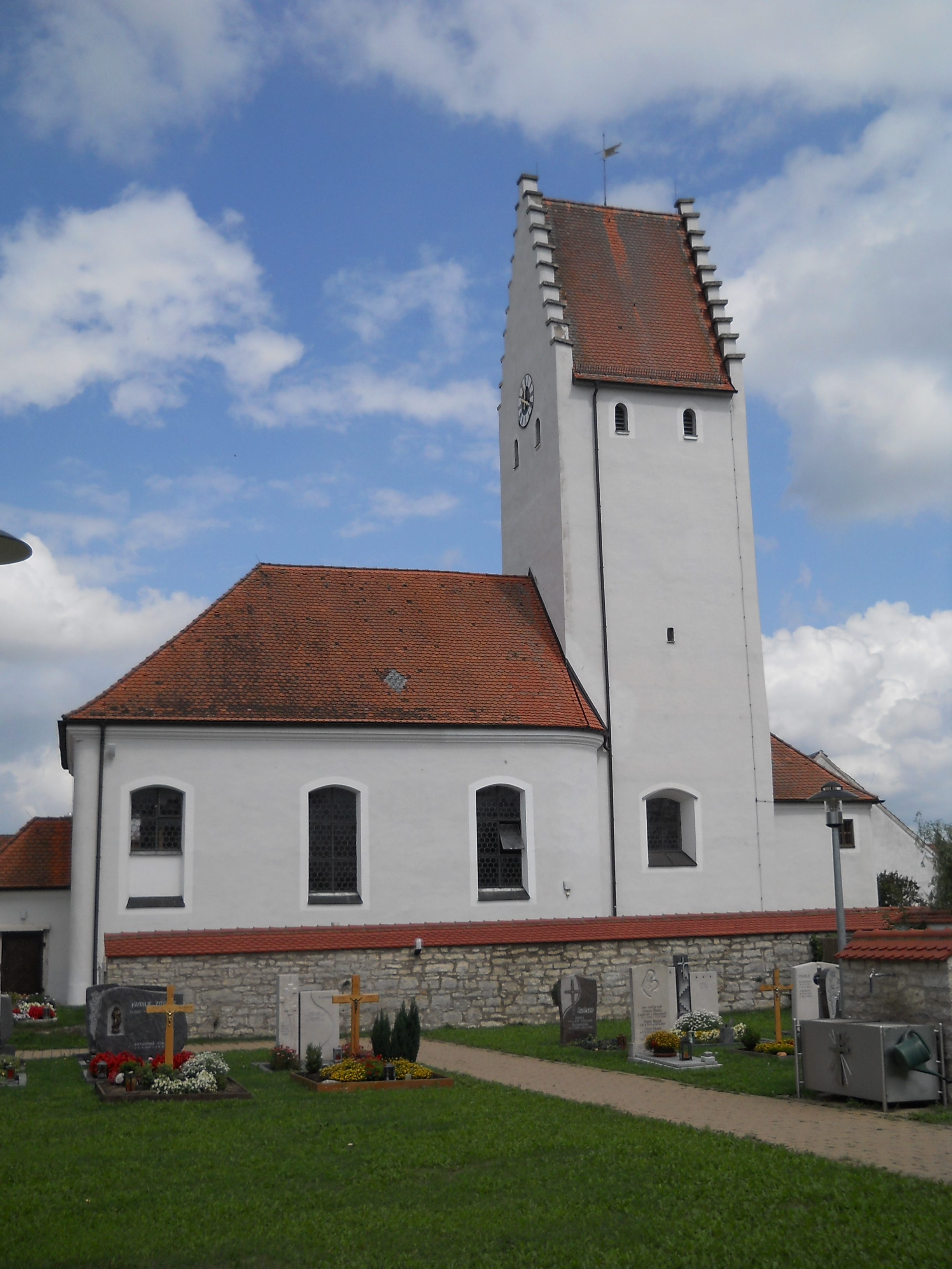 Die Pfarrkirche St. Ulrich in Kevenhüll, Gemeindeteil von Beilngries im oberbayerischen Landkreis Eichstätt